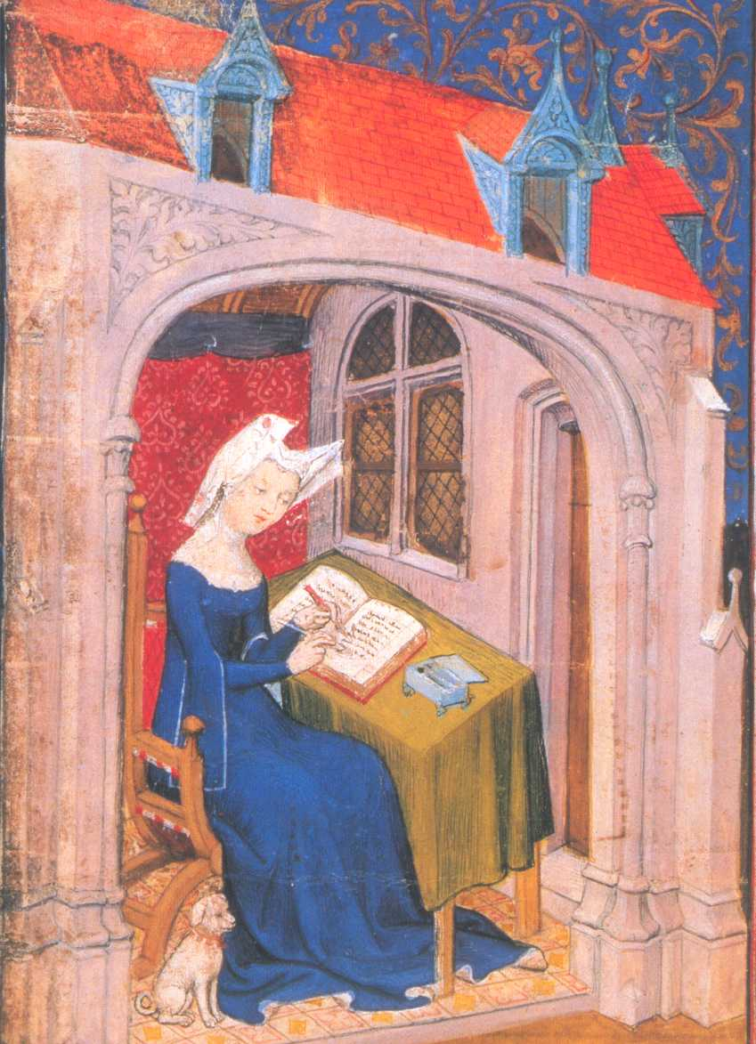 Christine de Pisan Cette oeuvre est issue de issue de Andrea Hopkins, Six Medieval Women, p. 108. L'oeuvre originale est dans le domaine public vu son âge. Il peut figurer sur wikipedia, conformément à la politique wiki en matière de peinture, telle qu'elle figure sur : "Accurate photographs of paintings lack expressive content and are automatically in the public domain once the painting's copyright has expired (which it has in the US if it was published before 1923). All other copyright notices can safely be ignored." Cette position, qui résulte du jugement Bridgeman -v- Corel, n'est pas contraire au droit d'auteur français, s'agissant de photographies de tableaux dépourvues d'originalité au sens du code de la propriété intellectuelle. infos: Christine de Pizan, Collected Works (1407), BL, MS Harley 4431, fol. ?.: Christine writing her own book, in her own room, within the conventionalized architecture of a house, holding scraper / eraser in left hand and pen in right, with her dog at her feet. Andrea Hopkins, Six Medieval Women, p. 108. Catégorie:Image provenant d'un manuscrit médiéval